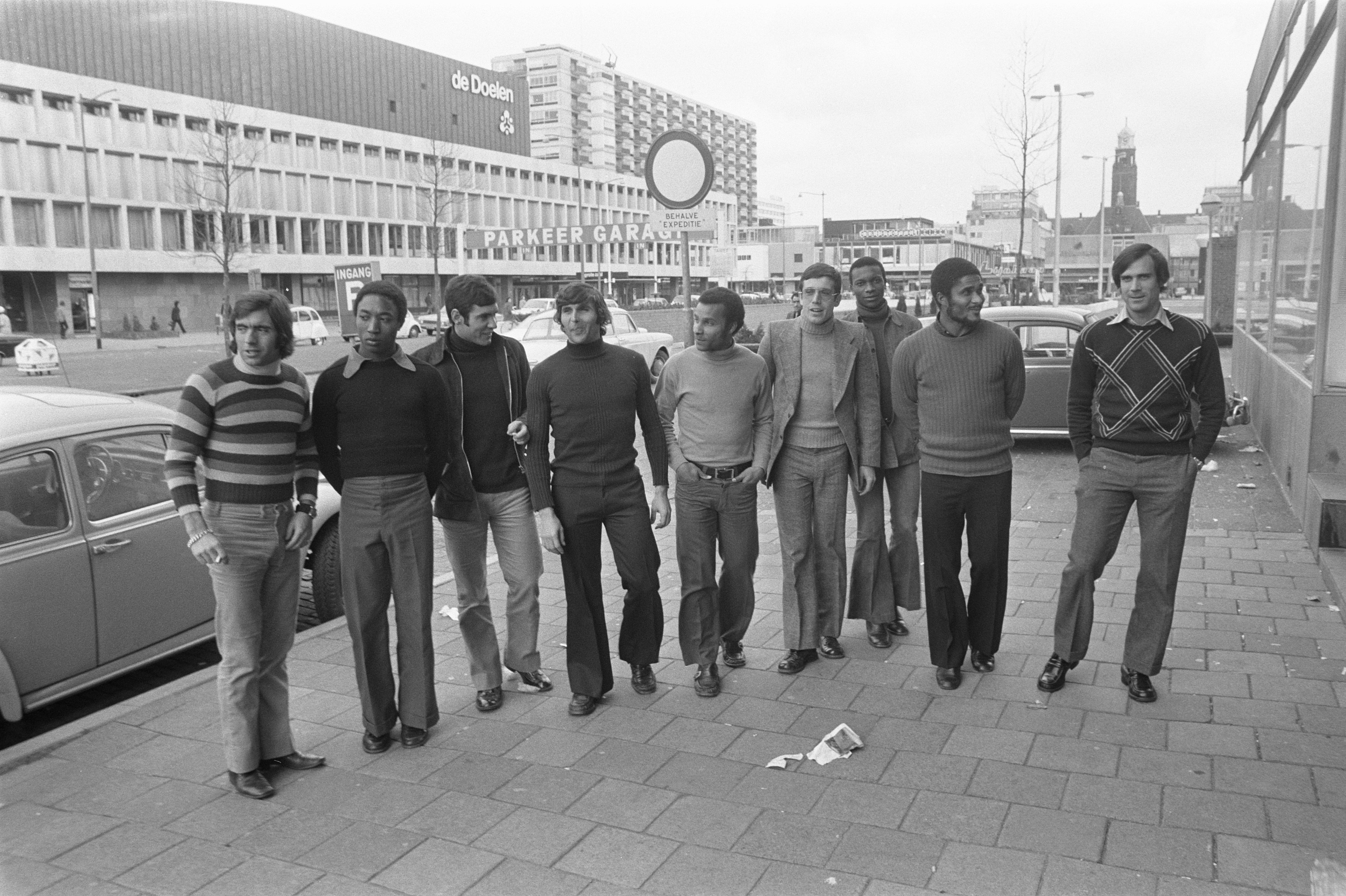 Collectie / Archief : Fotocollectie Anefo Reportage / Serie : [ onbekend ] Beschrijving : Benfica in Rotterdam voor Europacupwedstrijd tegen Feyenoord Benficaspelers Datum : 6 maart 1972 Locatie : Rotterdam, Zuid-Holland Trefwoorden : sport, voetballers Instellingsnaam : Benfica, Europa Cup, Feyenoord Fotograaf : Verhoeff, Bert / Anefo Auteursrechthebbende : Nationaal Archief Materiaalsoort : Negatief (zwart/wit) Nummer archiefinventaris : bekijk toegang 2.24.01.05 Bestanddeelnummer : 925-4363